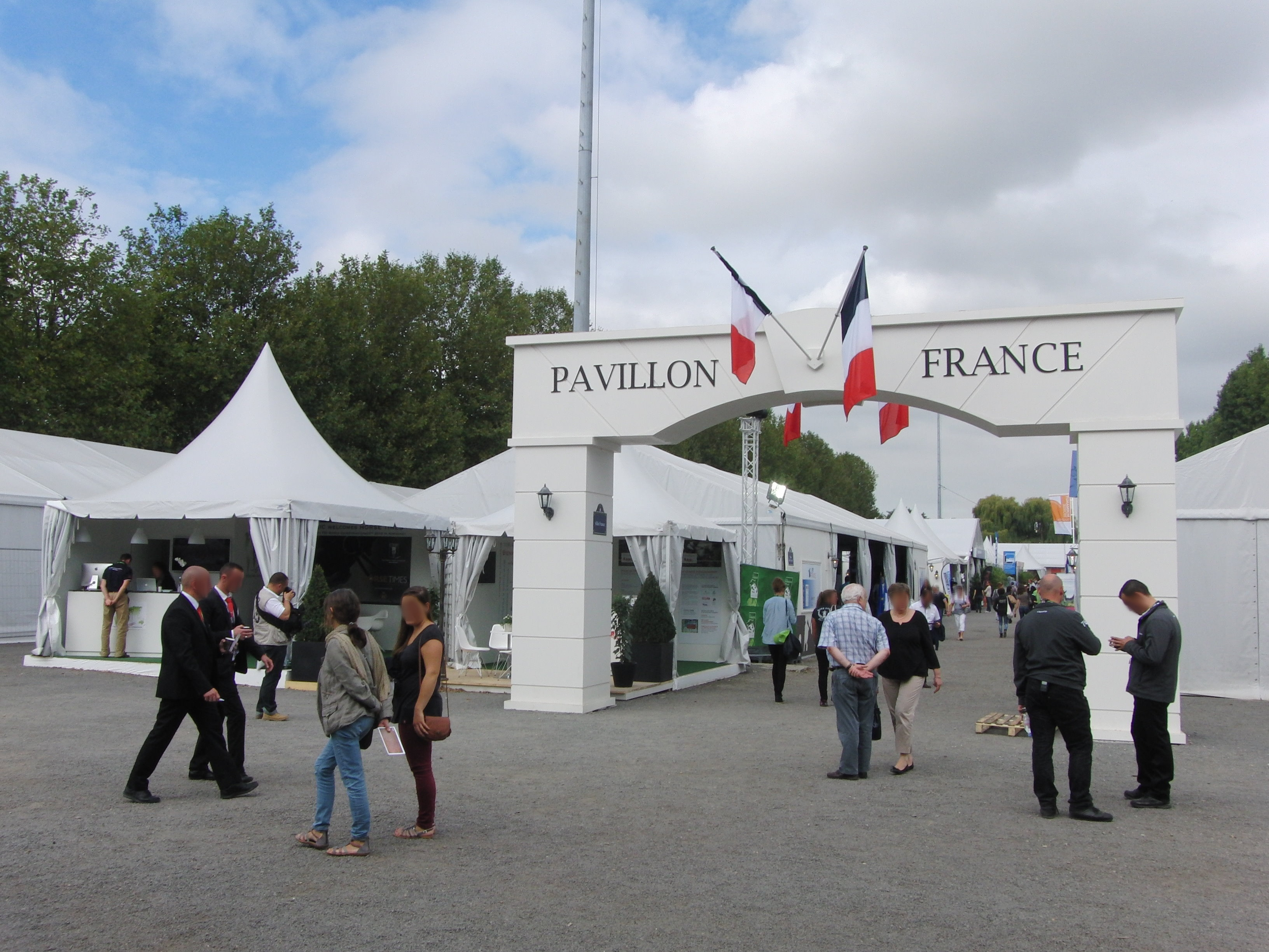 Jeux équestres mondiaux de 2014 - Le village des jeux